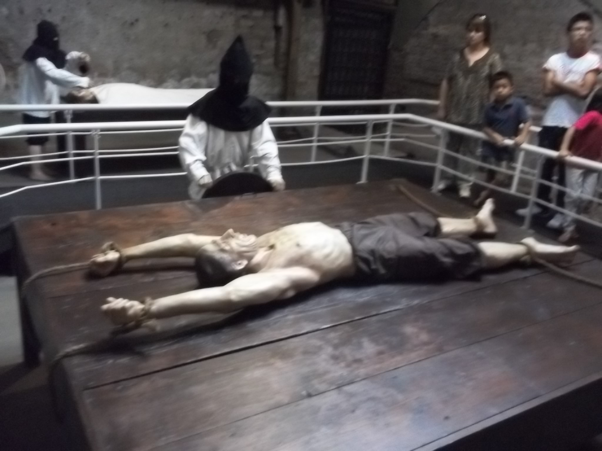 Sala adonde se muestra una tortura clásica de la inquisición: el potro de estiramiento.